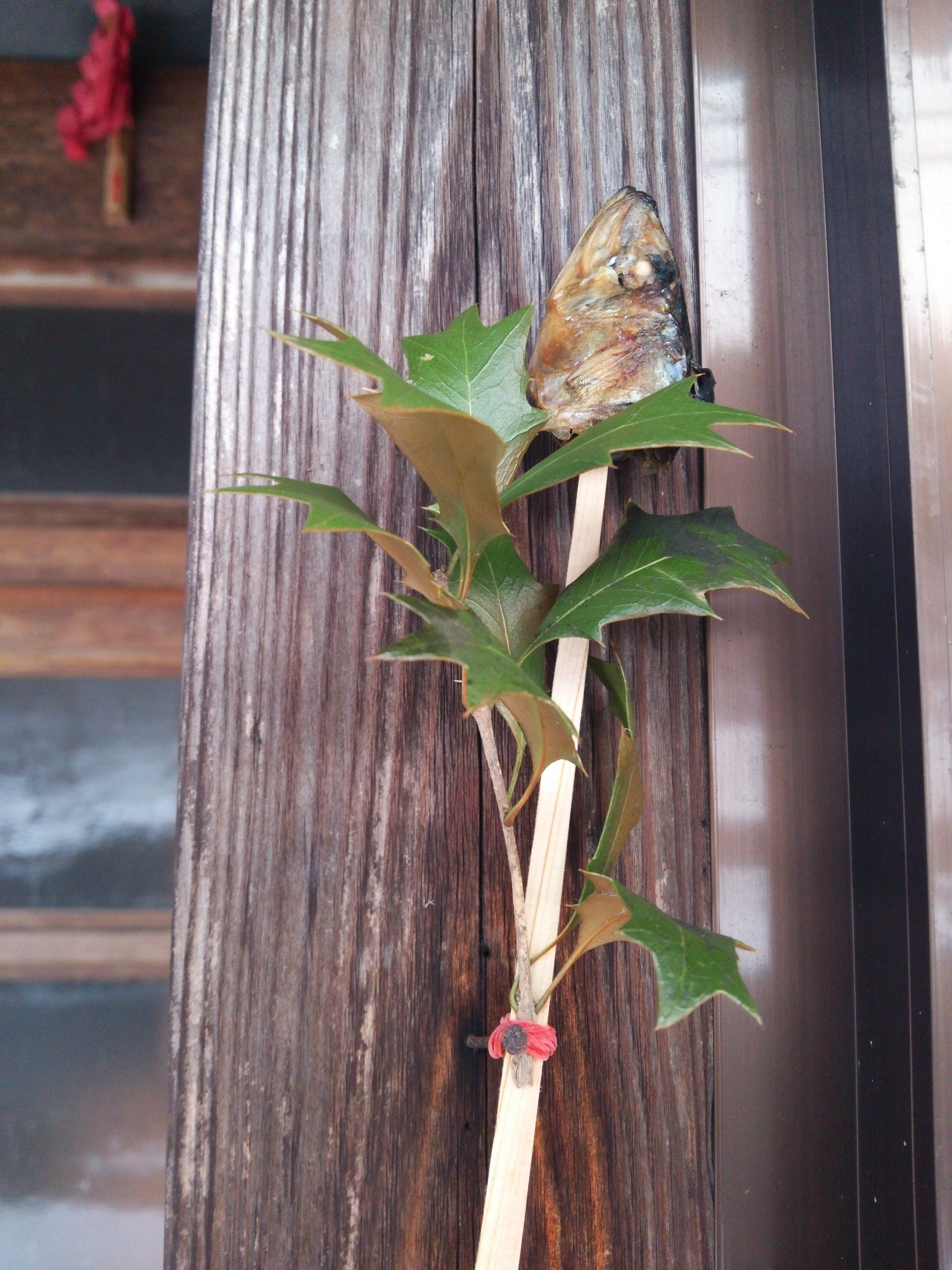 鰯の頭を柊の枝に刺して門口に飾る節分の魔除け